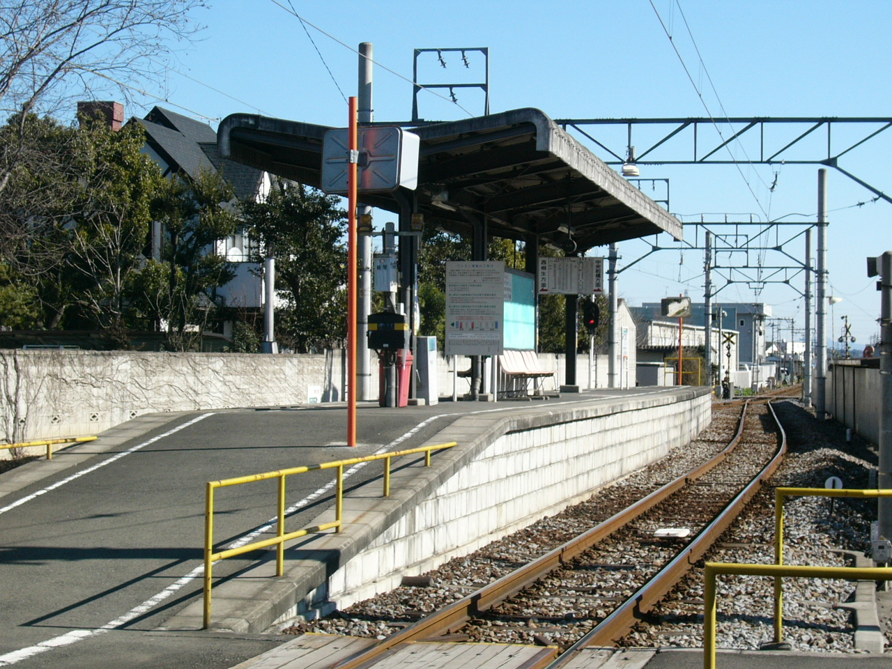 Mistumata Station